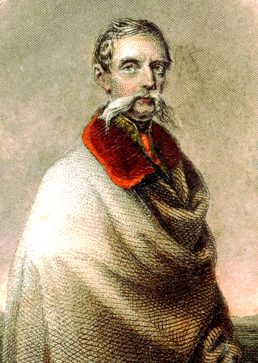 Báró Julius Jacob von Haynau (Kassel, Németország, 1786. október 14. – Bécs, 1853. március 14.) osztrák hadvezér, nevéhez fűződik az 1848-49-es forradalmat és szabadságharcot követő megfélemlítés